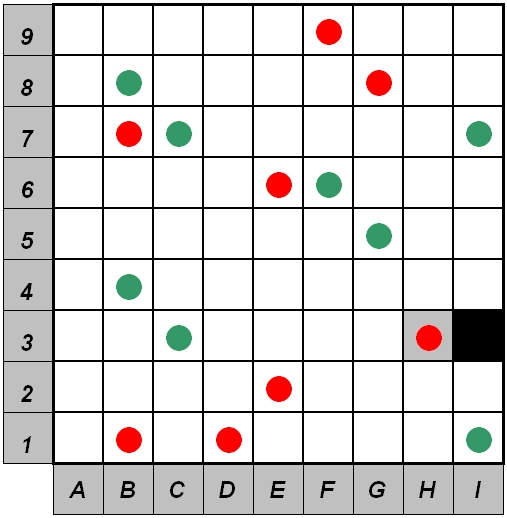 grille de crops - niveau de difficulté moindre , les premiers points d'une série sont donnés avec leur couleur (alternativement rouges et verts).